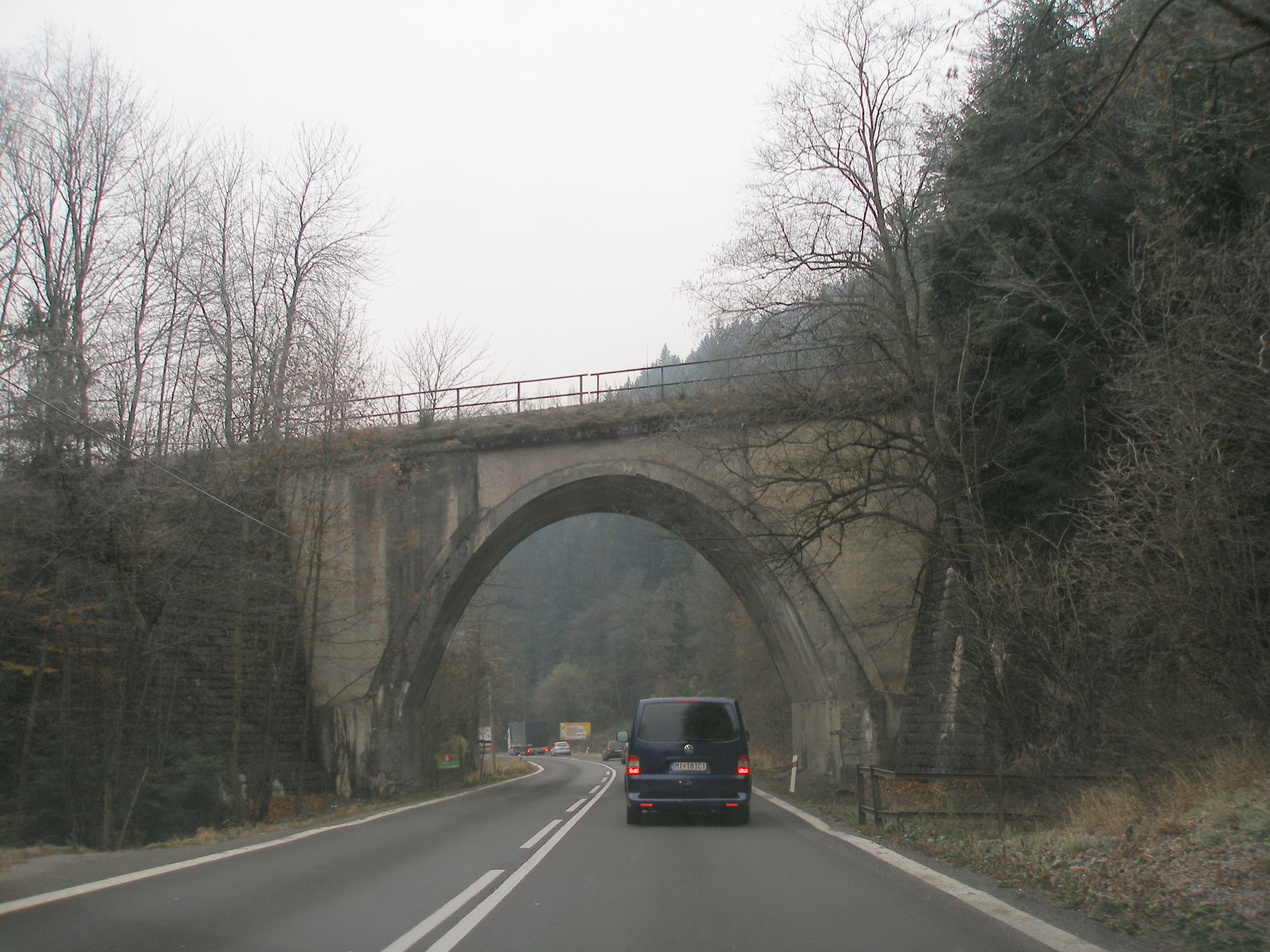 Cesta z obce Staré Hory do mesta Banská Bystrica.